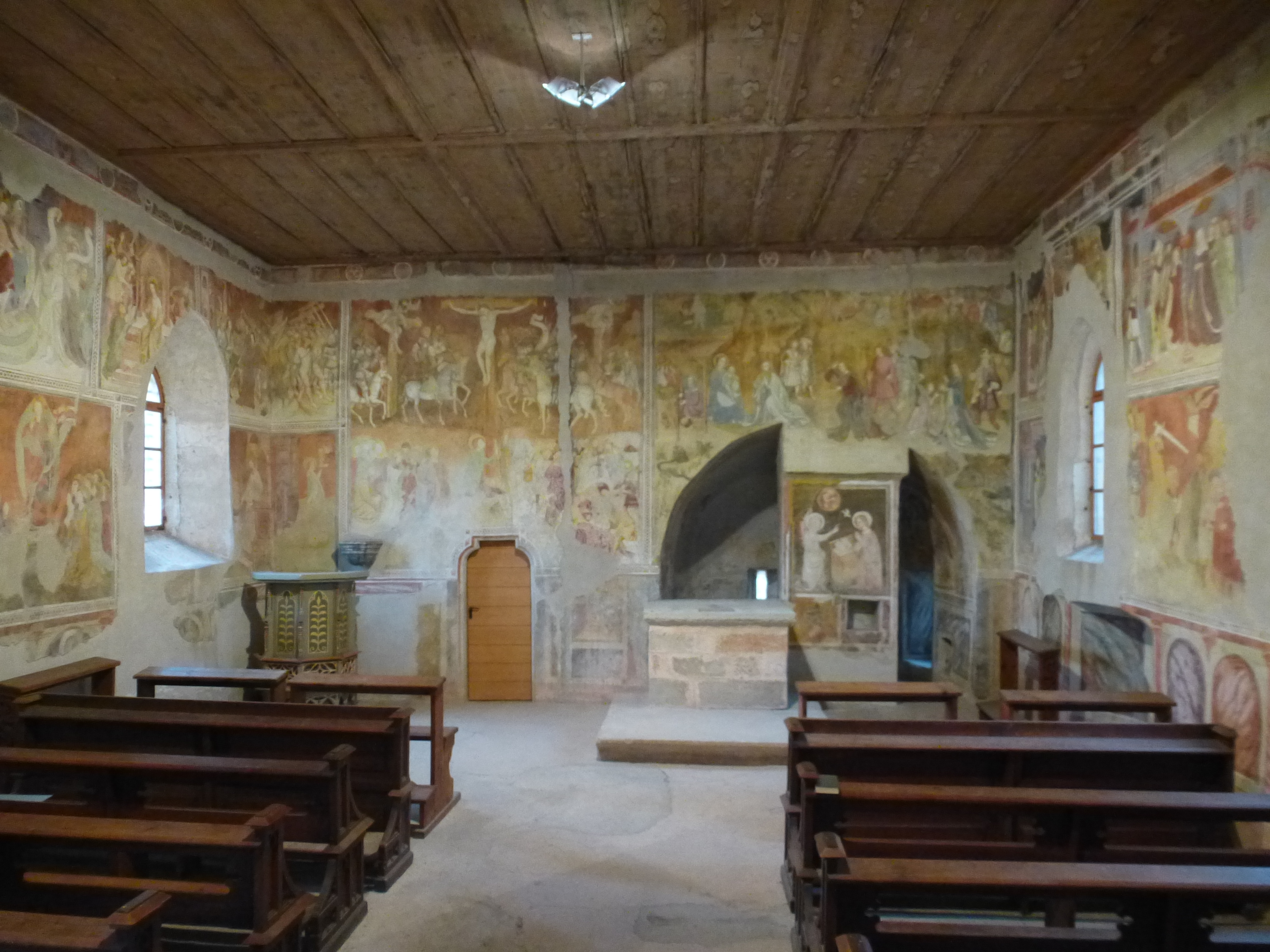 Innenraum der Kirche St. Valentin am Friedhof in Tramin mit Fresken von Meistern der "Bozner Schule", 1390-1420